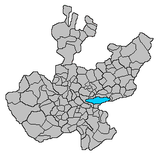 Map of Jalisco divided into municipios.